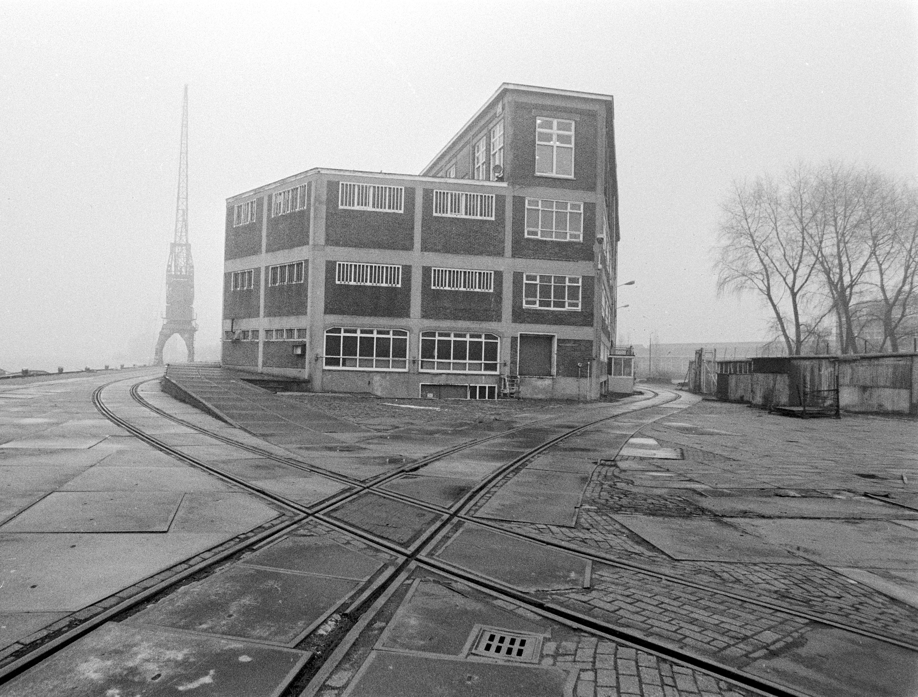 Collectie / Archief : Fotocollectie Anefo Reportage / Serie : [ onbekend ] Beschrijving : Veertig ateliers in voormalig KNSM-gebouw aan Amsterdamse Surinamekade voor beeldende kunstenaars, het voormalig KNSM-gebouw Datum : 3 maart 1981 Trefwoorden : ATELIERS, KUNSTENAARS, gebouwen Fotograaf : Bogaerts, Rob / Anefo Auteursrechthebbende : Nationaal Archief Materiaalsoort : Negatief (zwart/wit) Nummer archiefinventaris : bekijk toegang 2.24.01.05 Bestanddeelnummer : 931-3531